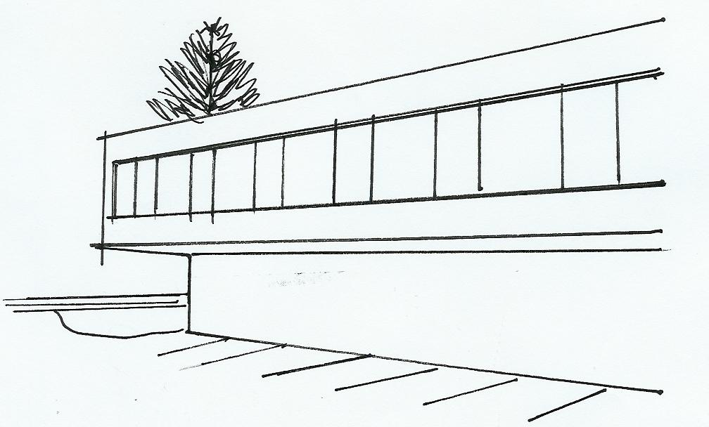 Verwaltungsgebäude Verkehrsbetrieb Biel